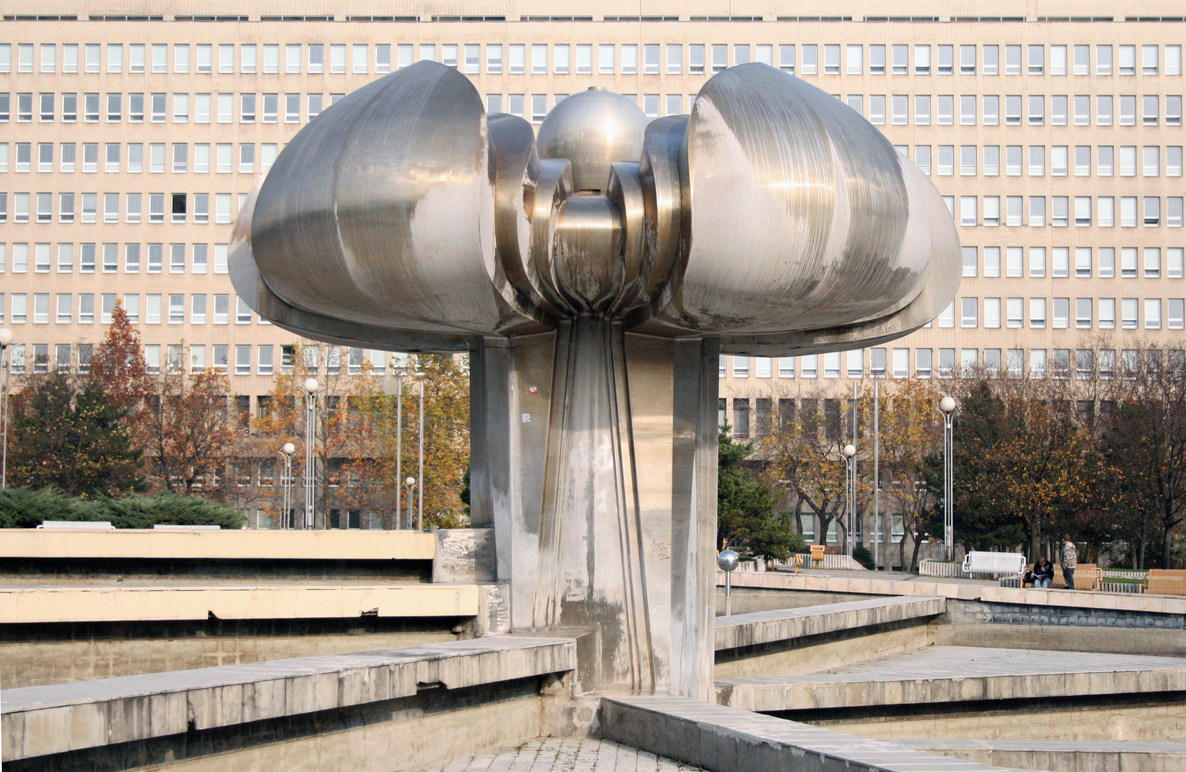 Fontana Družby na Námestí slobody v Bratislave.